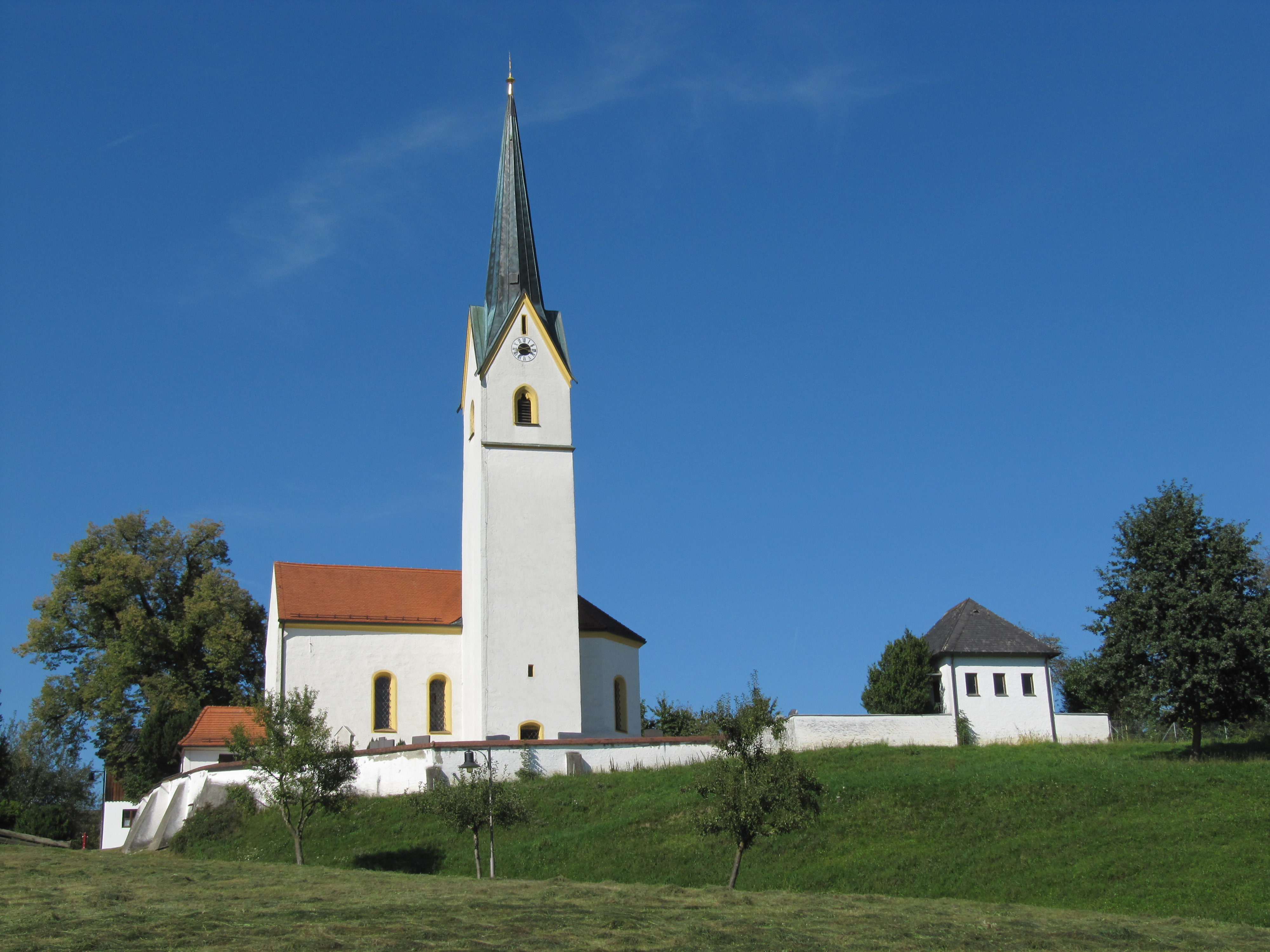 Wallfahrtskirche St. Leonhard, Stephanskirchen